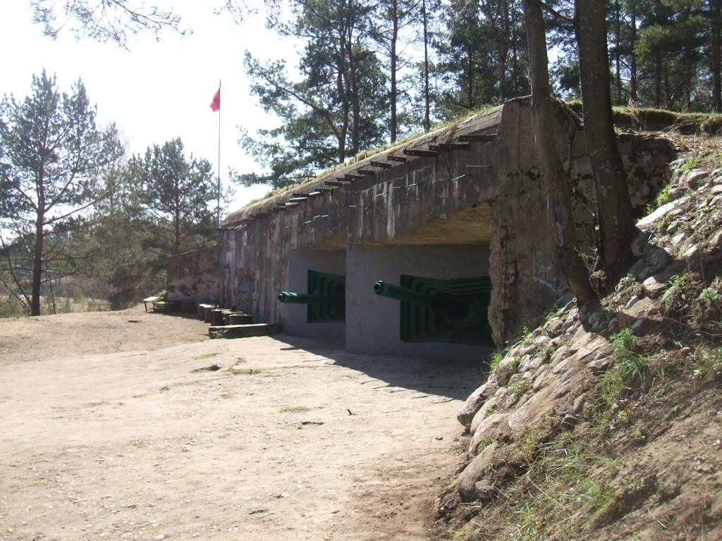 Музей в ДОТе у Сестрорецкого болота в системе бывшего КаУРа